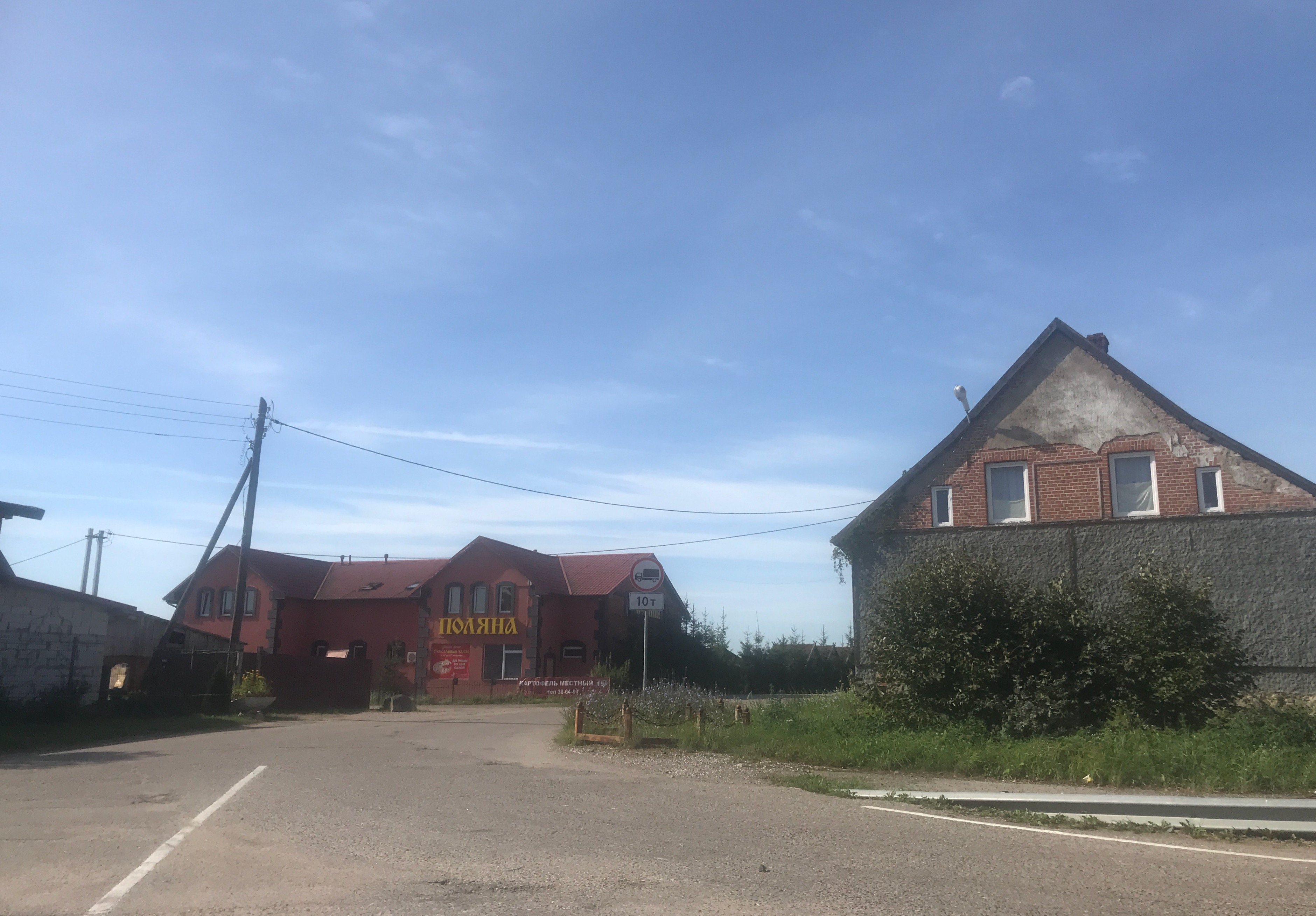 Талпаки